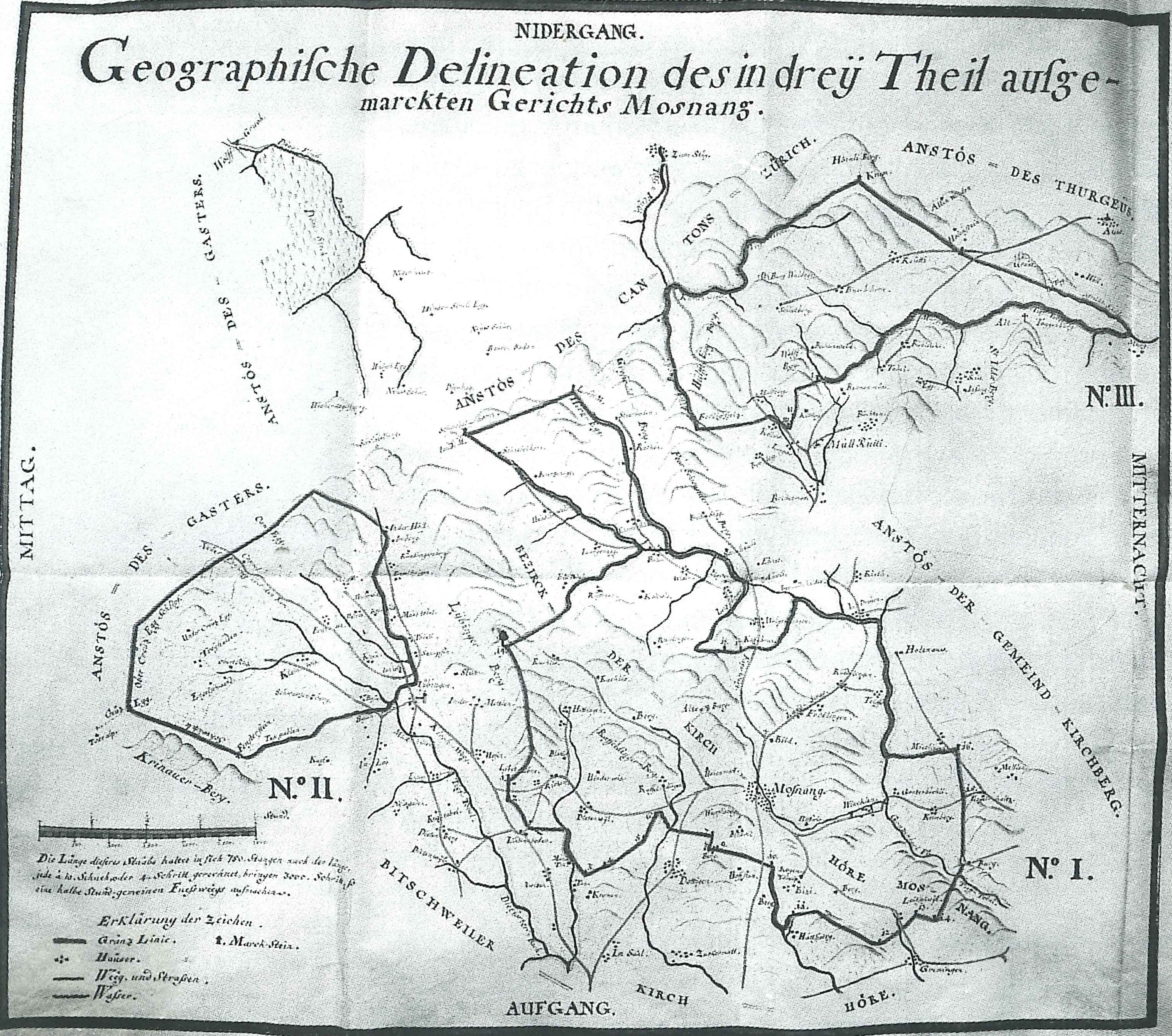 Grenzen des in drei Teile aufgegliederten alten Gerichts Mosnang.Karte im Stiftsarchiv St. Gallen